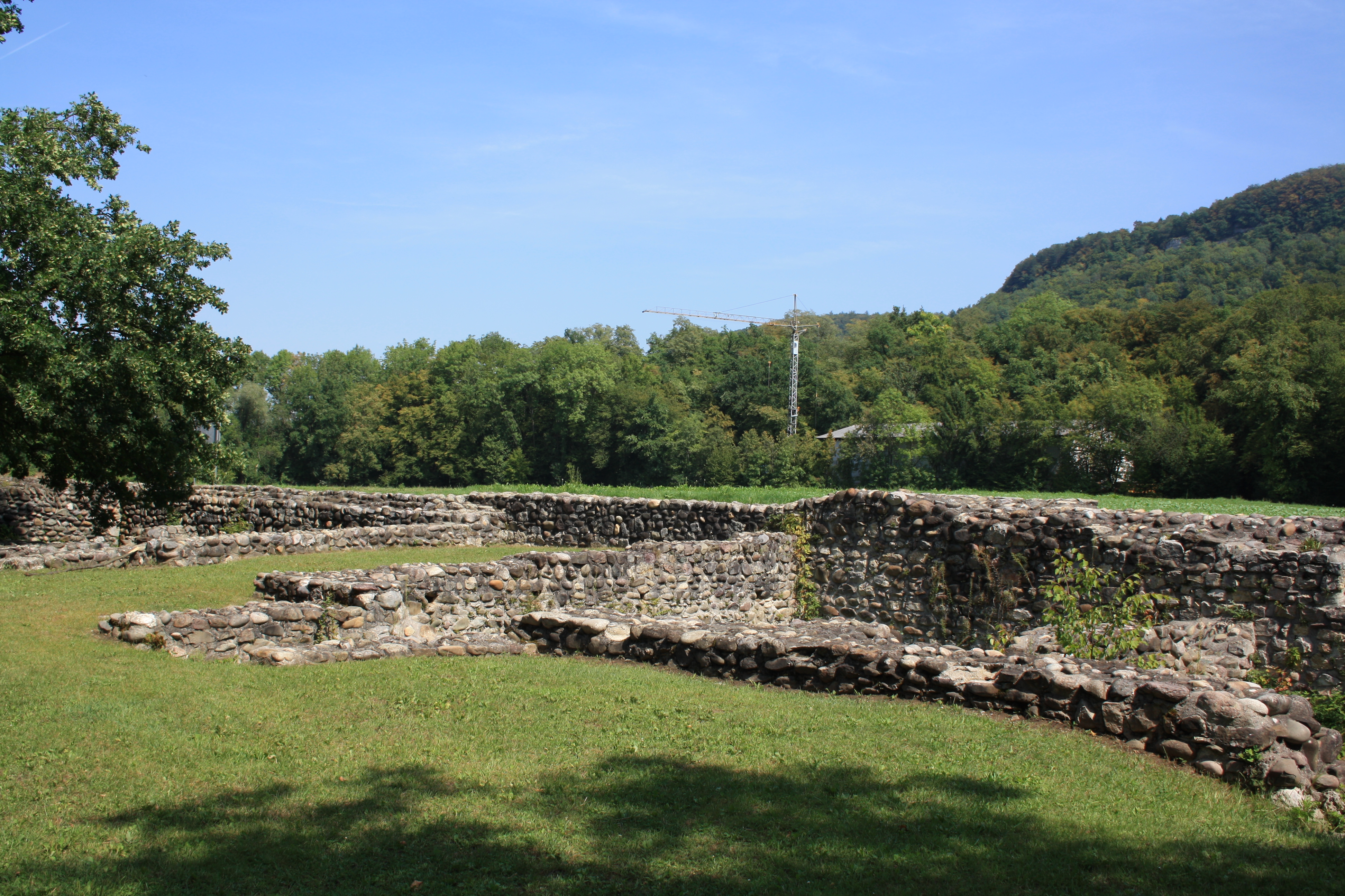 Template:Ruine Freudenau, Gem. Untersiggenthal